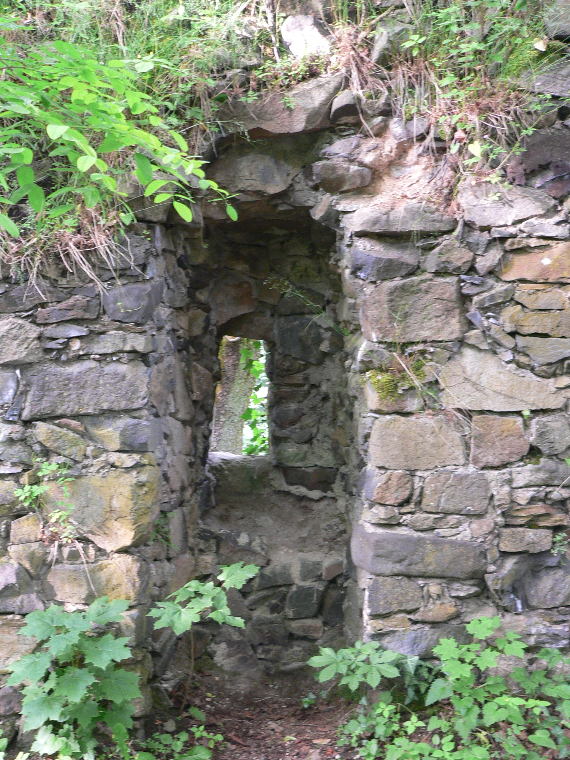 Schiesskammer des Alten Schlosses in Bad Berneck, NW-Seite des Palas.